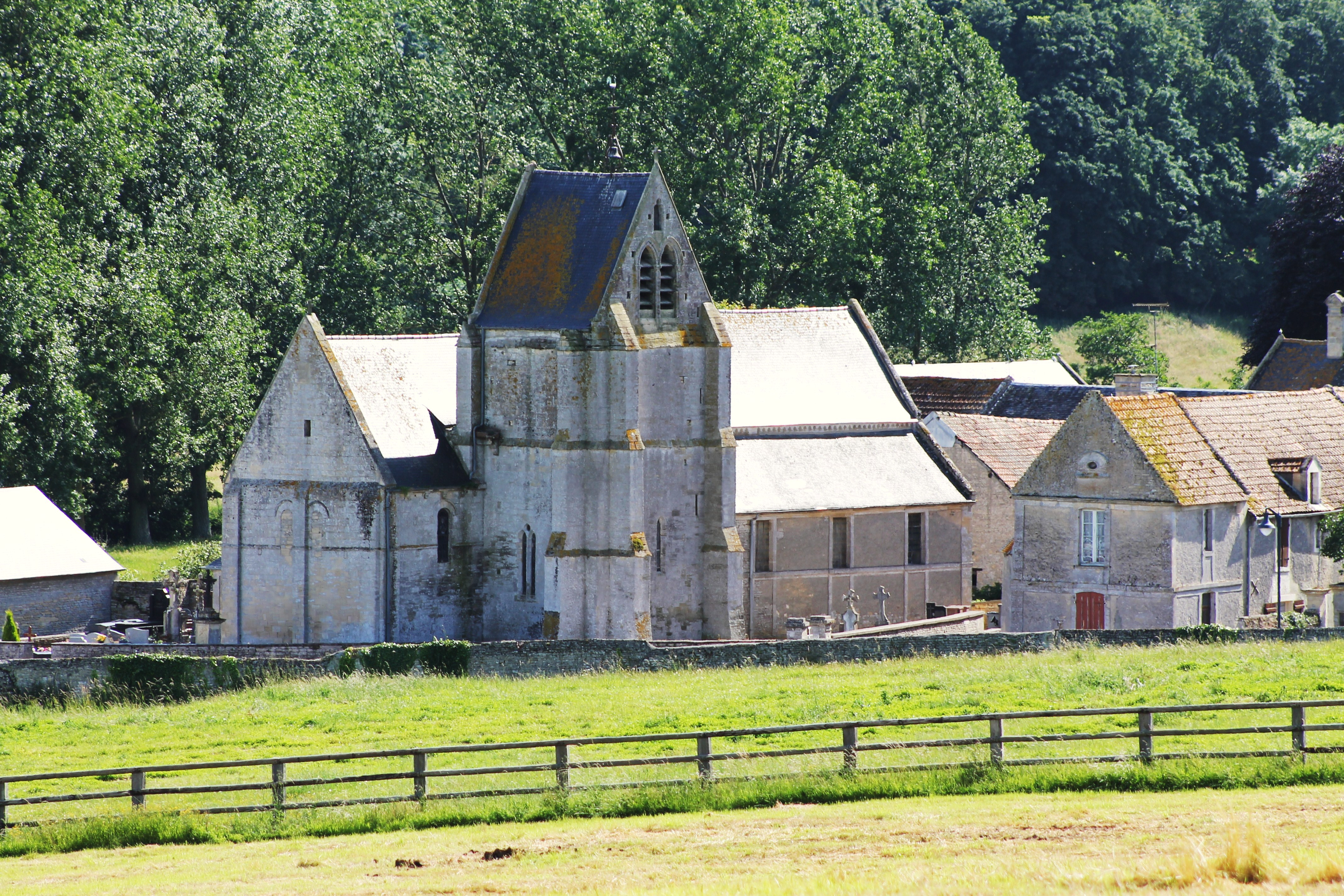 L'église st Martin de Tierceville, Calvados, France